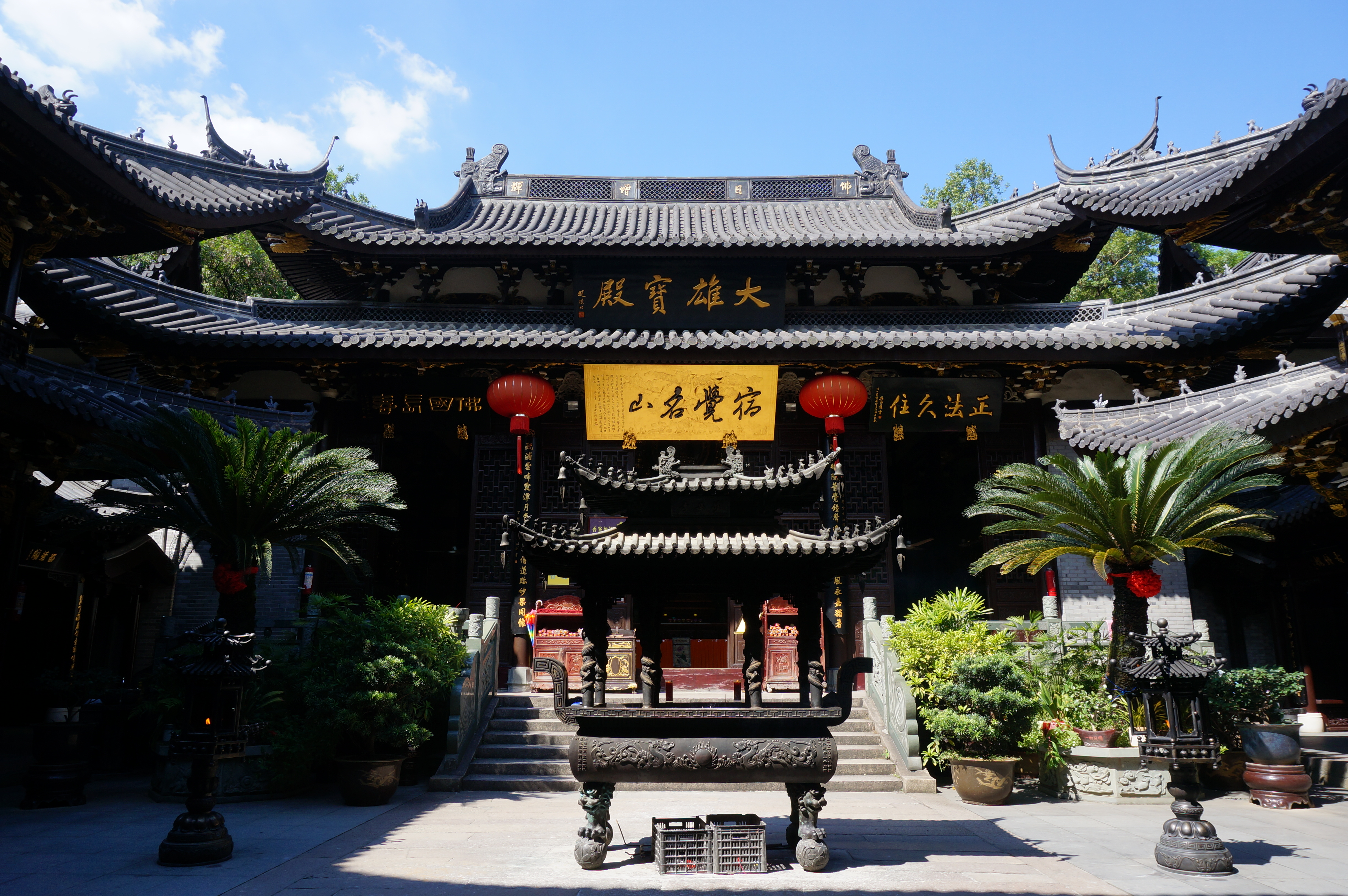 温州妙果寺，大雄宝殿南面。